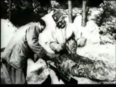 Filmkocka a katyni áldozatok exhumálásáról szóló náci propagandafilmből